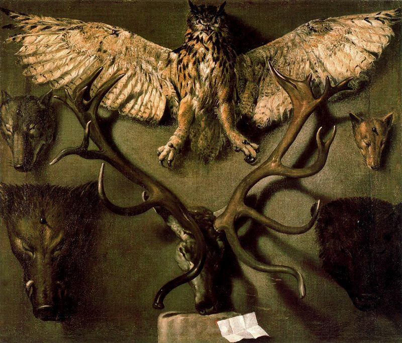 Banyes de cèrvol. 1626. Palau Reial, Madrid